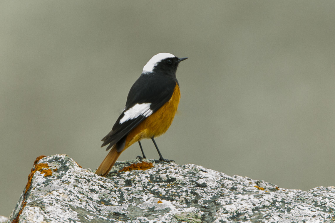 Guldenstadt's Redstart - Altai - Kazakistan_S4E4329